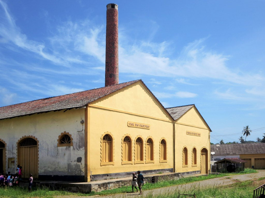 Palm oil factory, Casa das Caldeiras, Roça Agua Izé, Sao Tome Island, São Tomé and Príncipe.